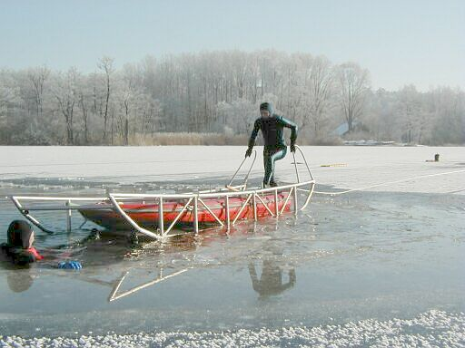 Bild eines Eisrettungsschlittens im Einsatz